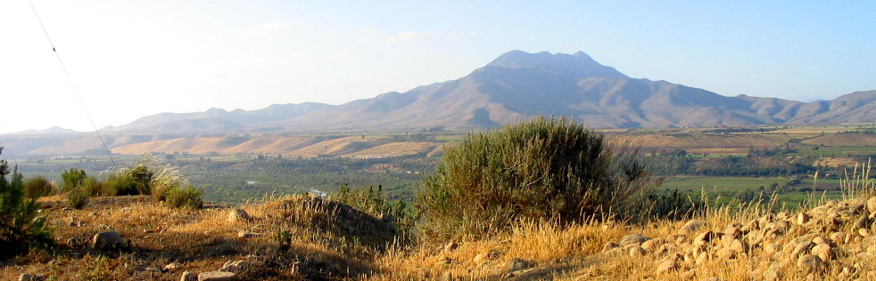 Cerro Tamaya, ubicado en la IV Región de Chile. Foto tomada desde San Julián.